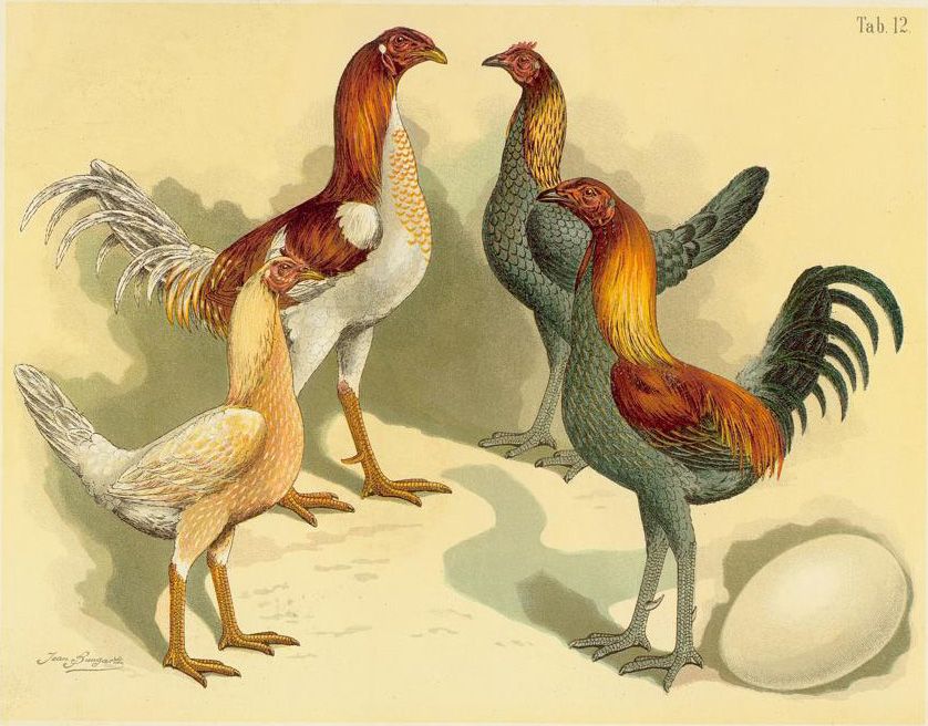 Englisches Kampfhuhn. Gallus dom. pugnax britanicus. Game fowl. Combattant anglaise. Belgisches Kampfhuhn. Gallus dom. pugnax flandricus. Belgian game fowl. Poules de Combattant du Nord.